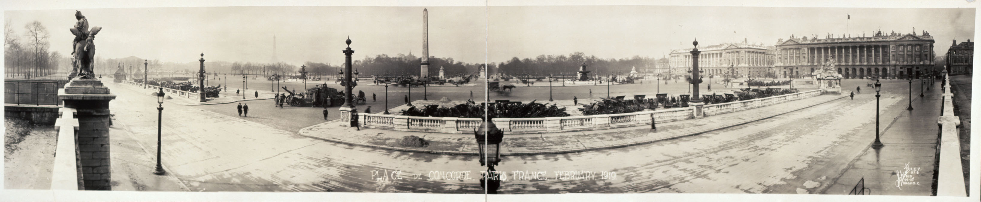 Place de la Concorde, Paris, France (1919)